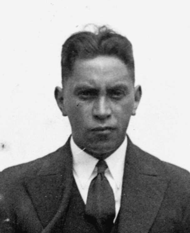 Korokī (1908/1909? - 1966) (Korokī Te Rata Mahuta Pōtatau Te Wherowhero), Māori King